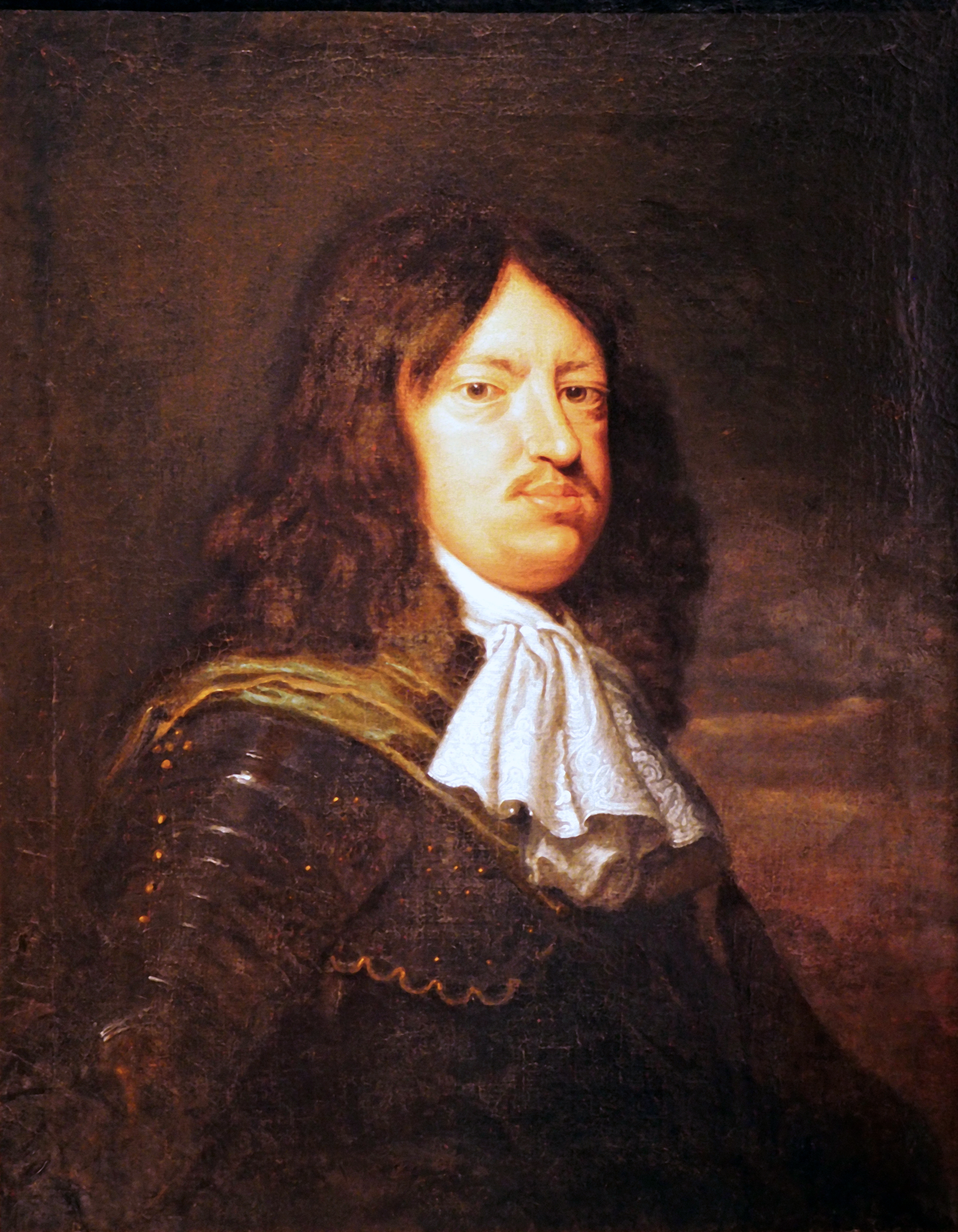 Christian Ludwig, Herzog von Braunschweig-Lüneburg